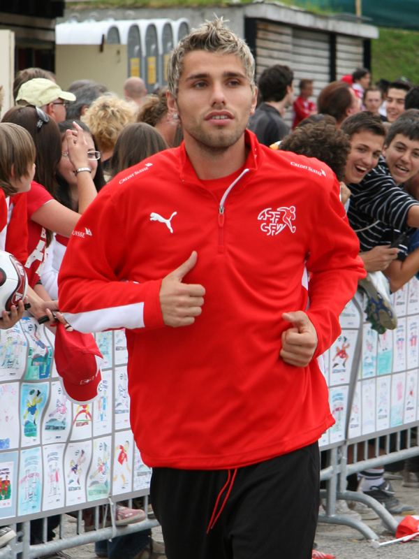 Valon Behrami im Trainingslager der Schweizer Fussballnationalmannschaft vor der Euro 2008